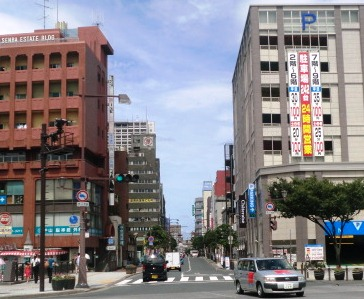 福岡県北九州市小倉北区のみかげ通りです。